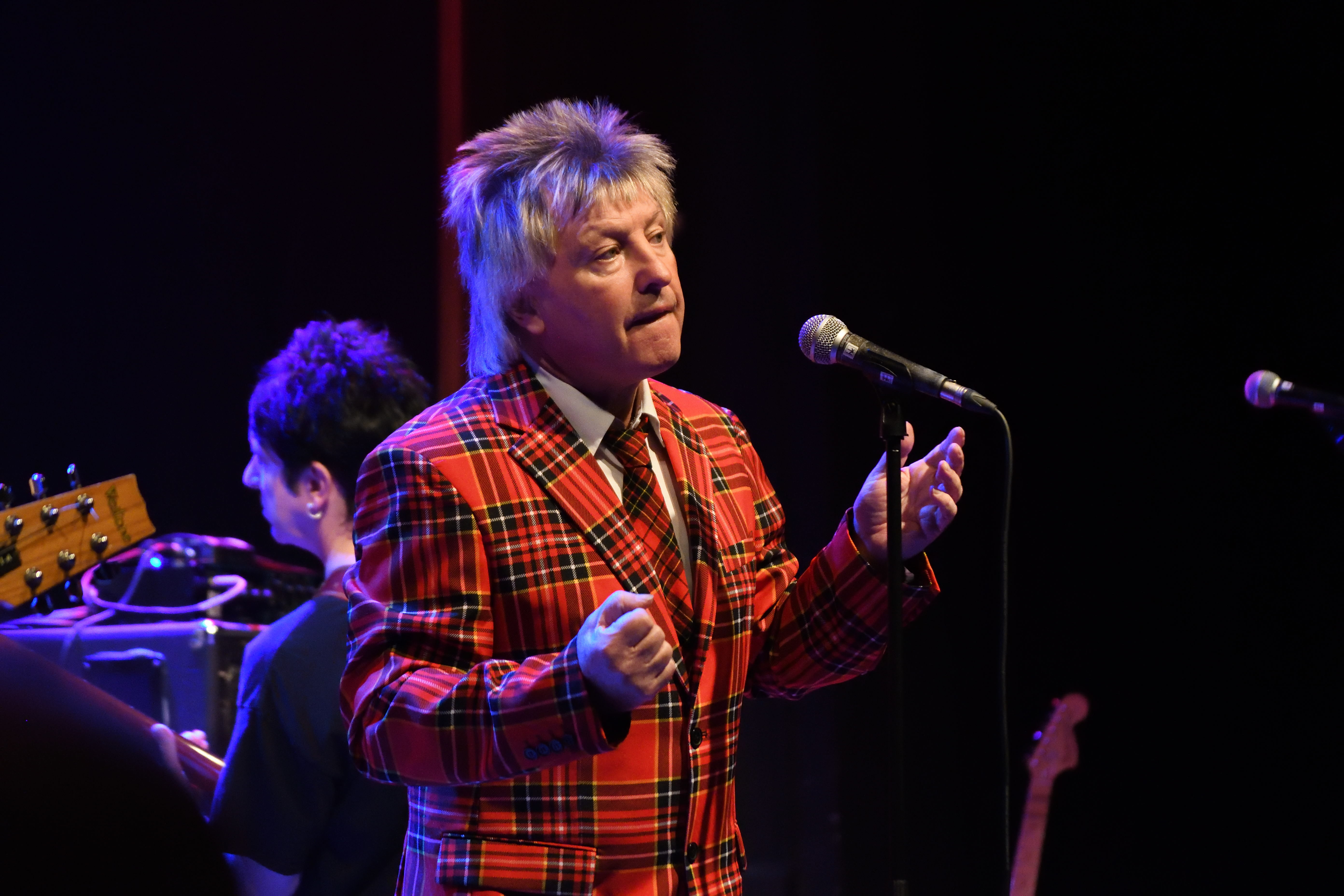 The Bollock Brothers Sänger und Frontmann Jock McDonald - 25.11.2018 Piano Dortmund